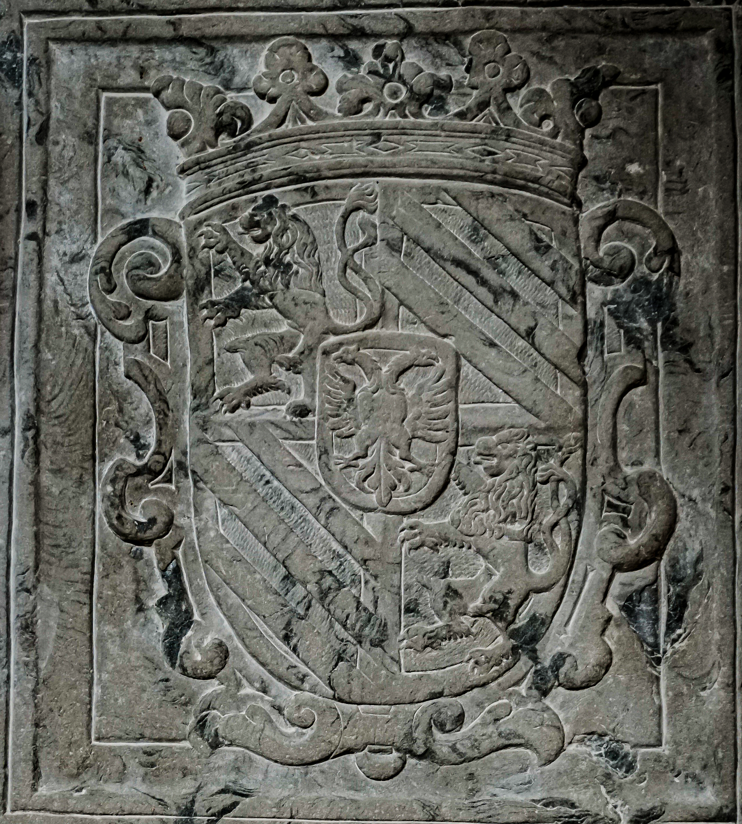 Balingen - Stadtkirche Balingen - Freigestellt aus Grabplatte Katharina Friederike Gräfin zu Candel